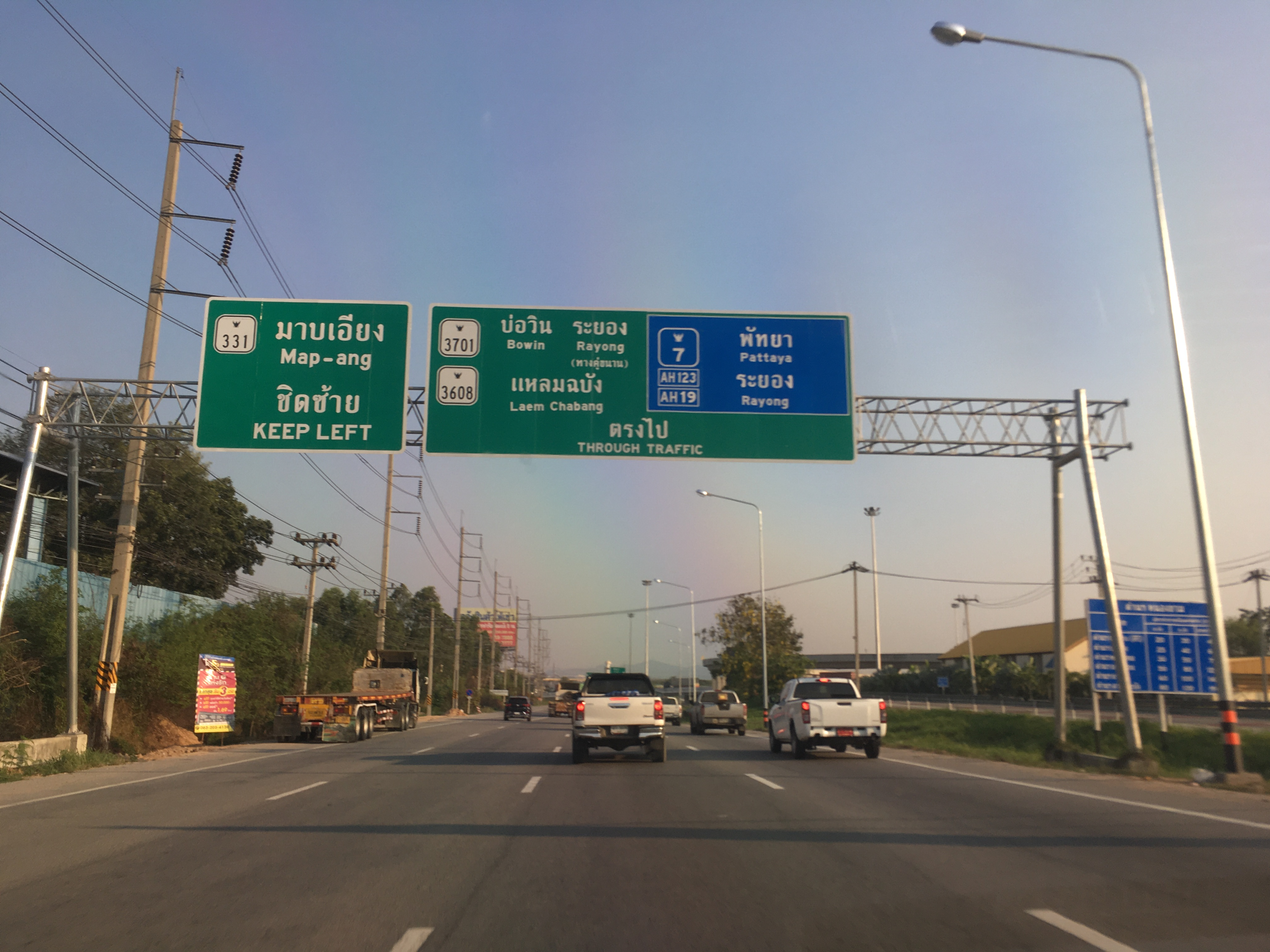 ต่างระดับหนองขาม ช่วงทางหลวง 3701